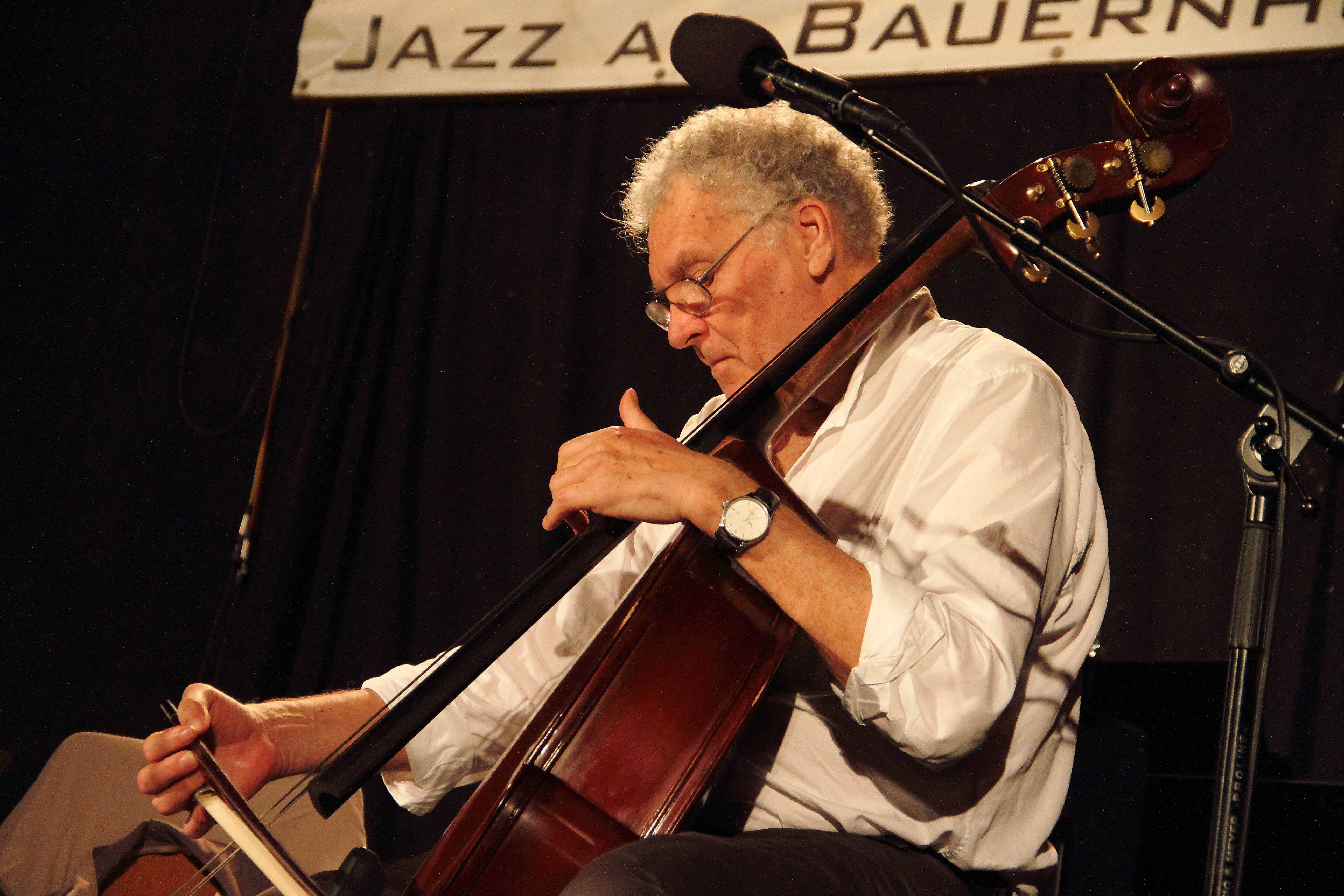 Miroslav Vitouš & Adam Pierończyk beim INNtöne Jazzfestival 2017